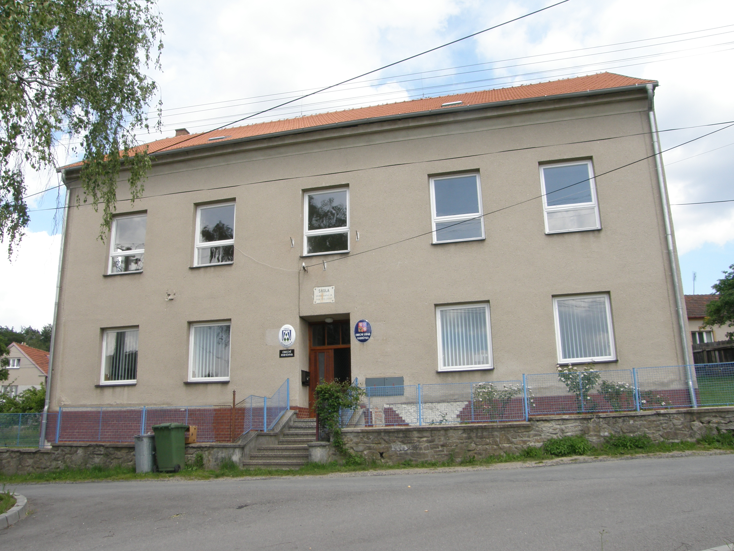 Obecní úřad, základní škola a knihovna v Habrůvce